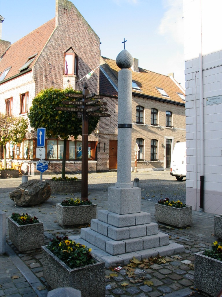 Perroeen - eigen foto